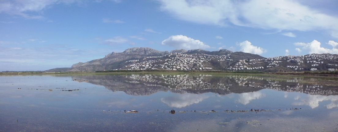 Parque natural del Marjal de Pego-Oliva This is a photography of a Site of Community Importance in Spain with the ID: ES0000147. Natura2000 entry, EEA entry